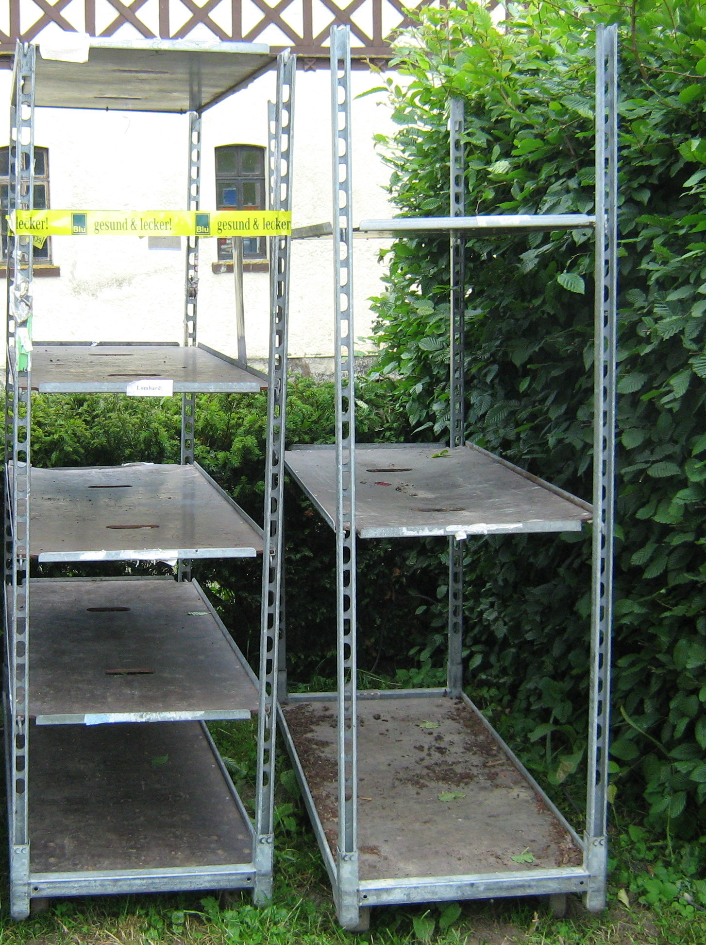 CC-Container für Topf-Blumen von der Gasa Group Dänemark